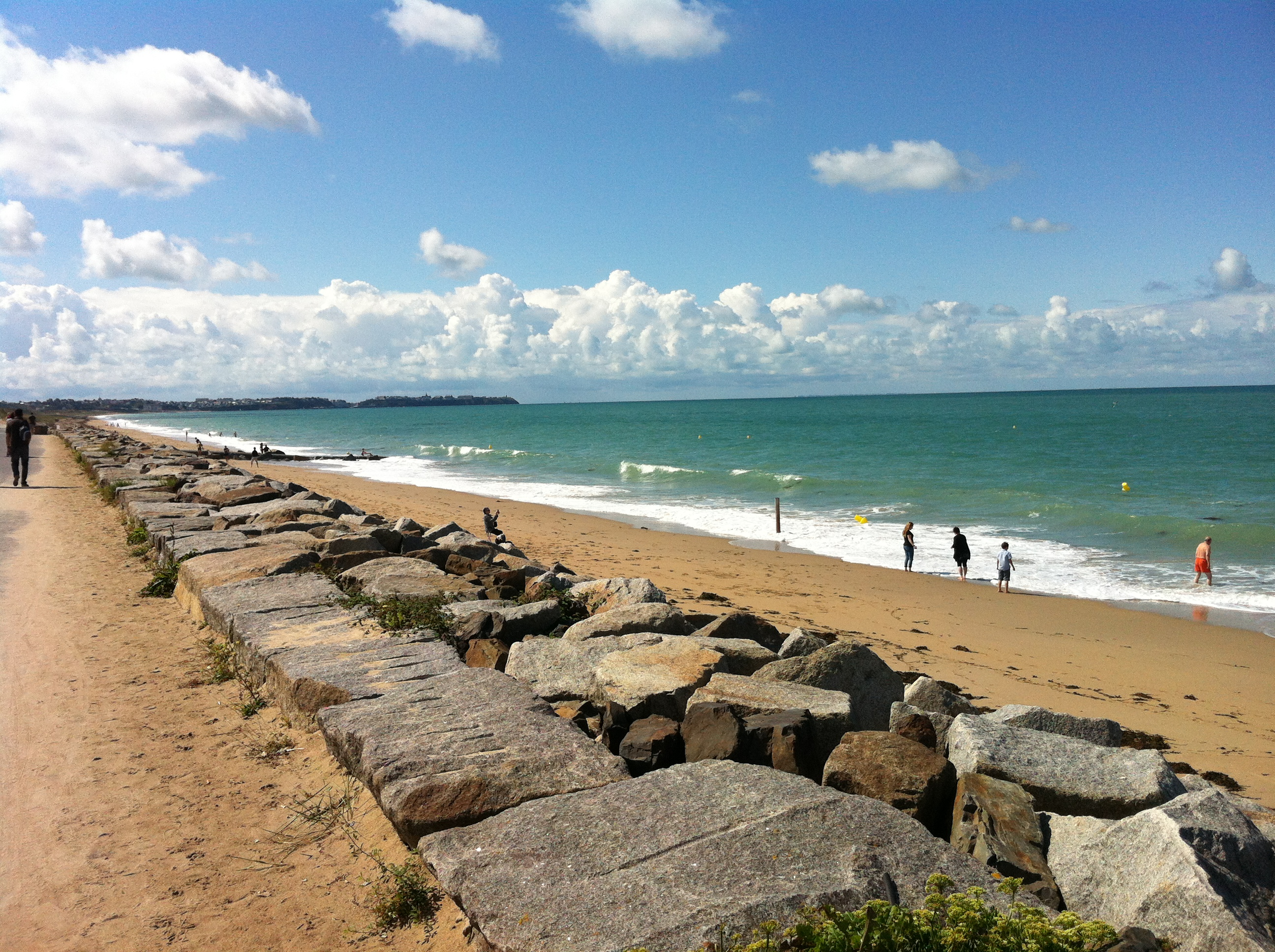 Au fond, le rocher de Granville